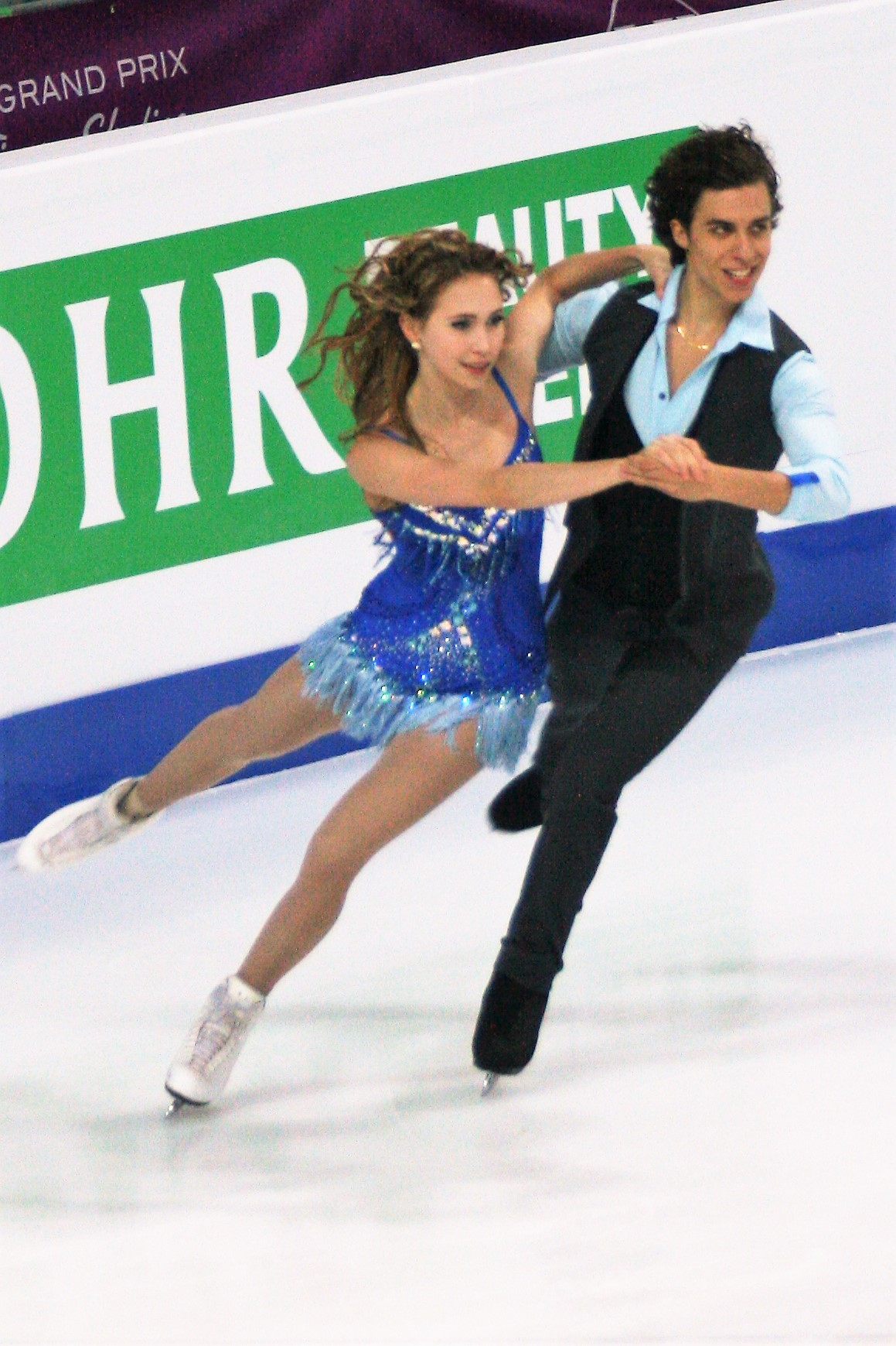 Анжелика Абашкина / Луи Торон (Франция) на финале Гран-при по фигурному катанию среди юниоров 2016-2017